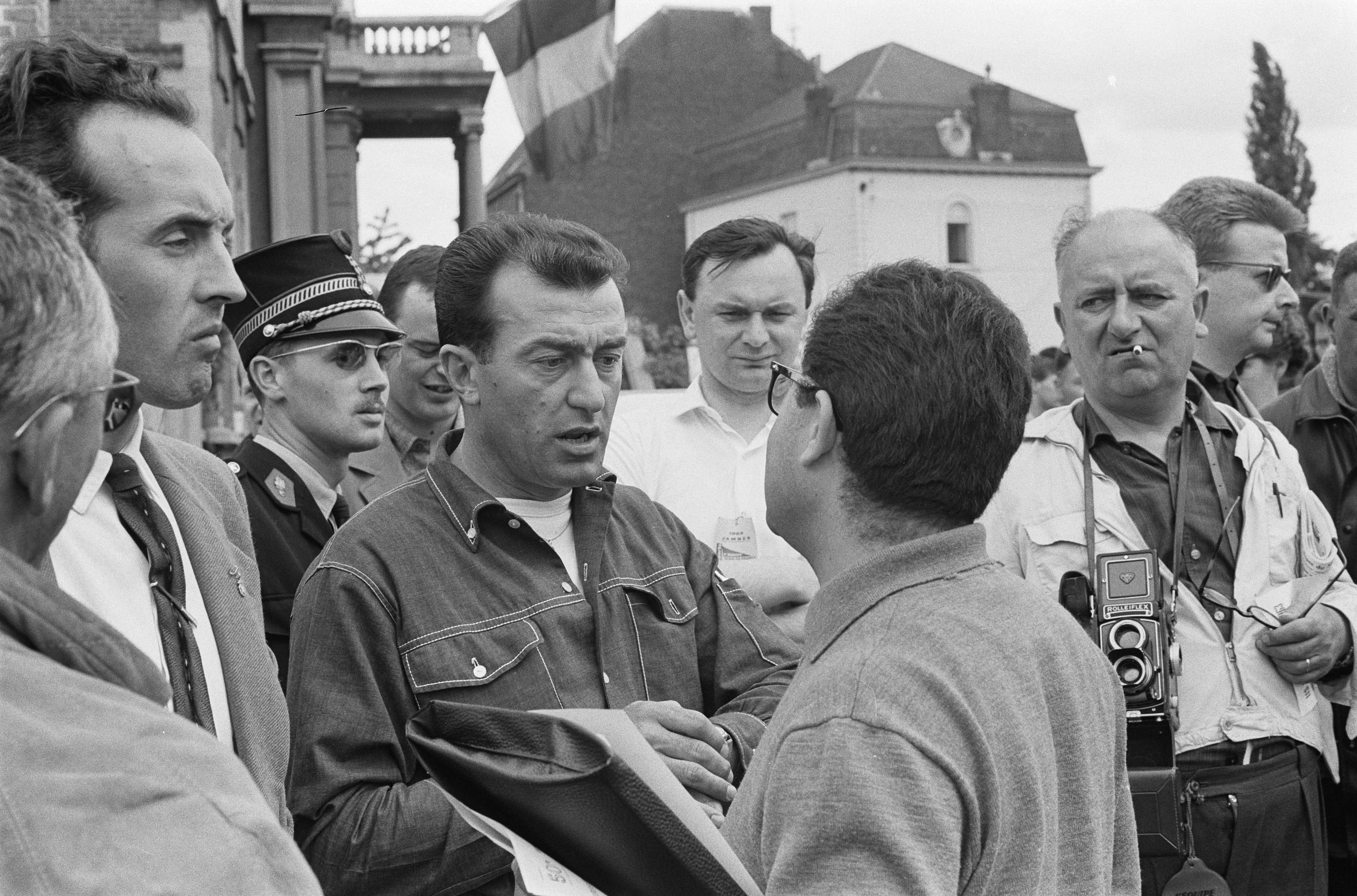 Tour de France bij de start. Louison Bobet.